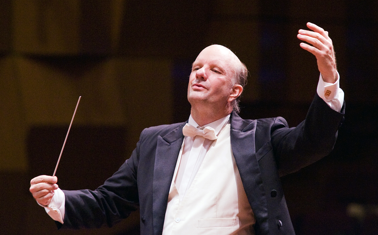 Volker Hartung, Chefdirigent von Junge Philharmonie Köln